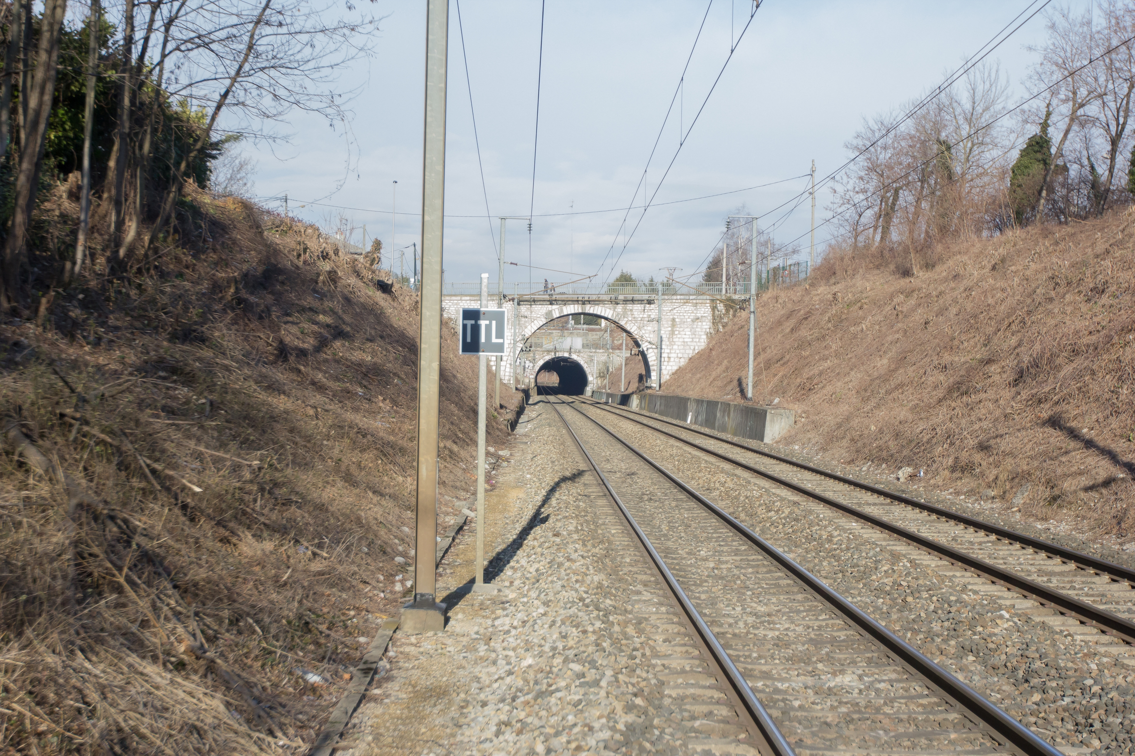 Gare de Voreppe (Voreppe, Isère, France)